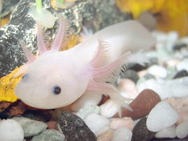 Ambystoma mexicanum, leucistic